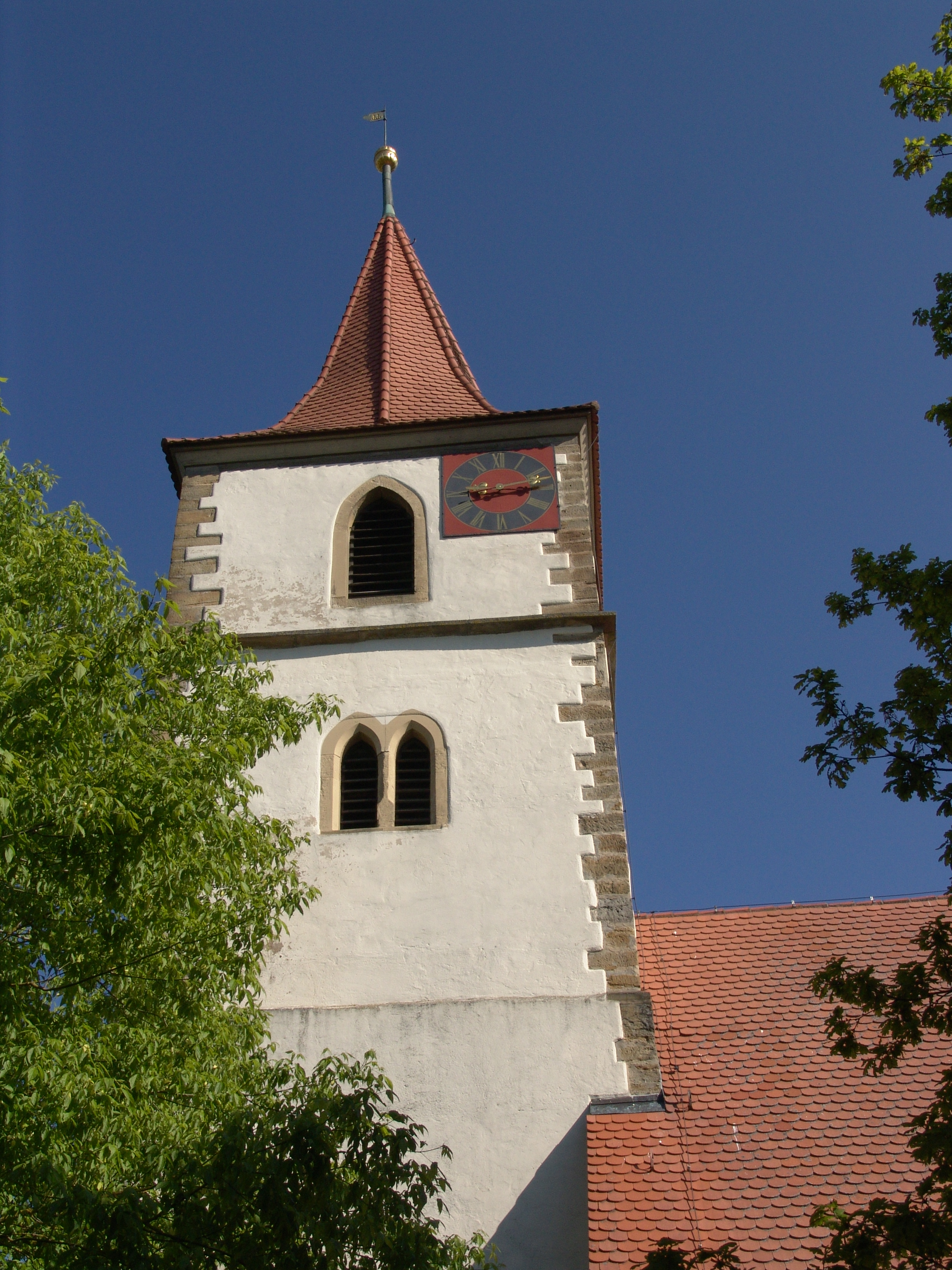 evang.-luth Kirche St. Maria in Steinach an der Ens